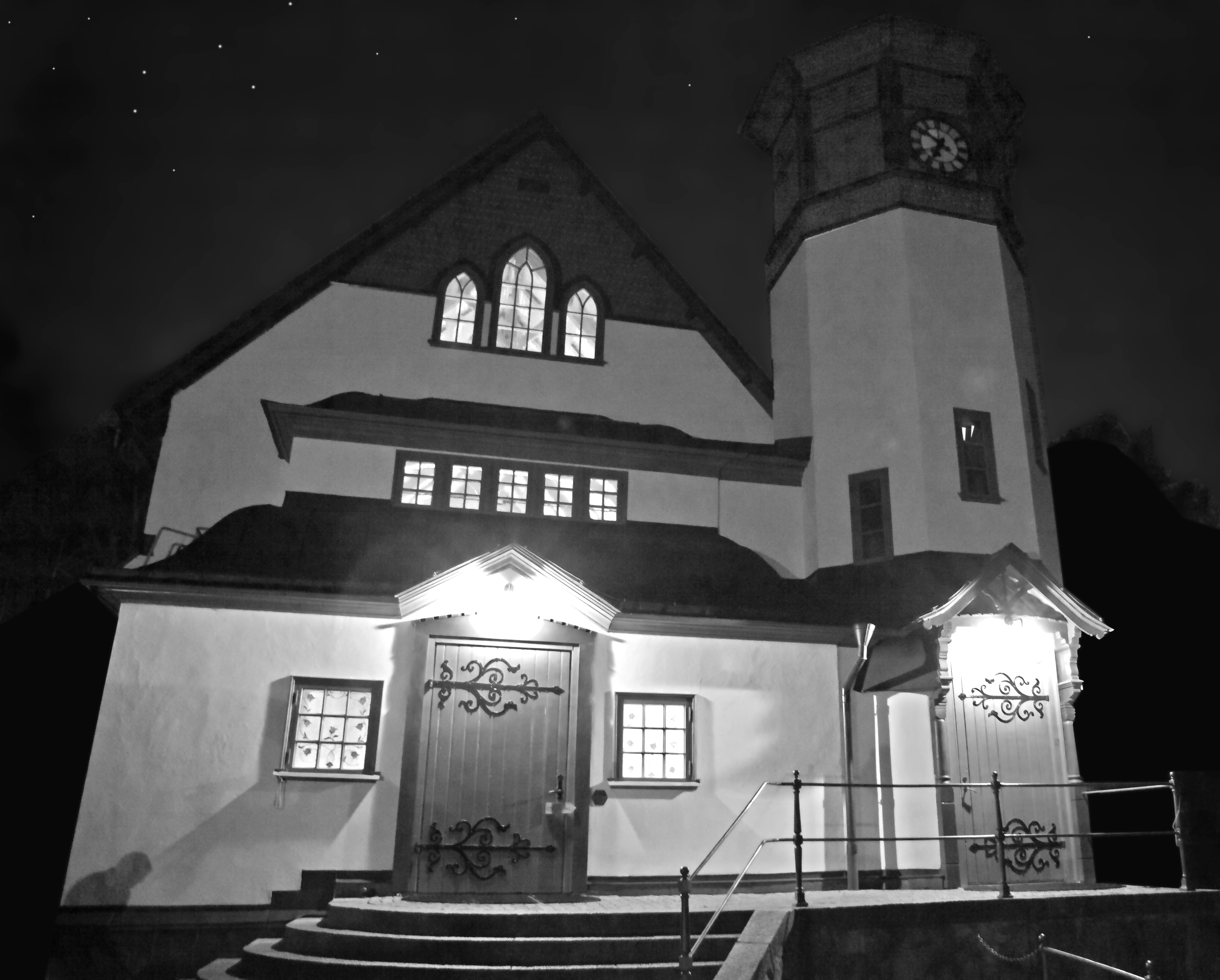 Djursholm's chapel December 2011